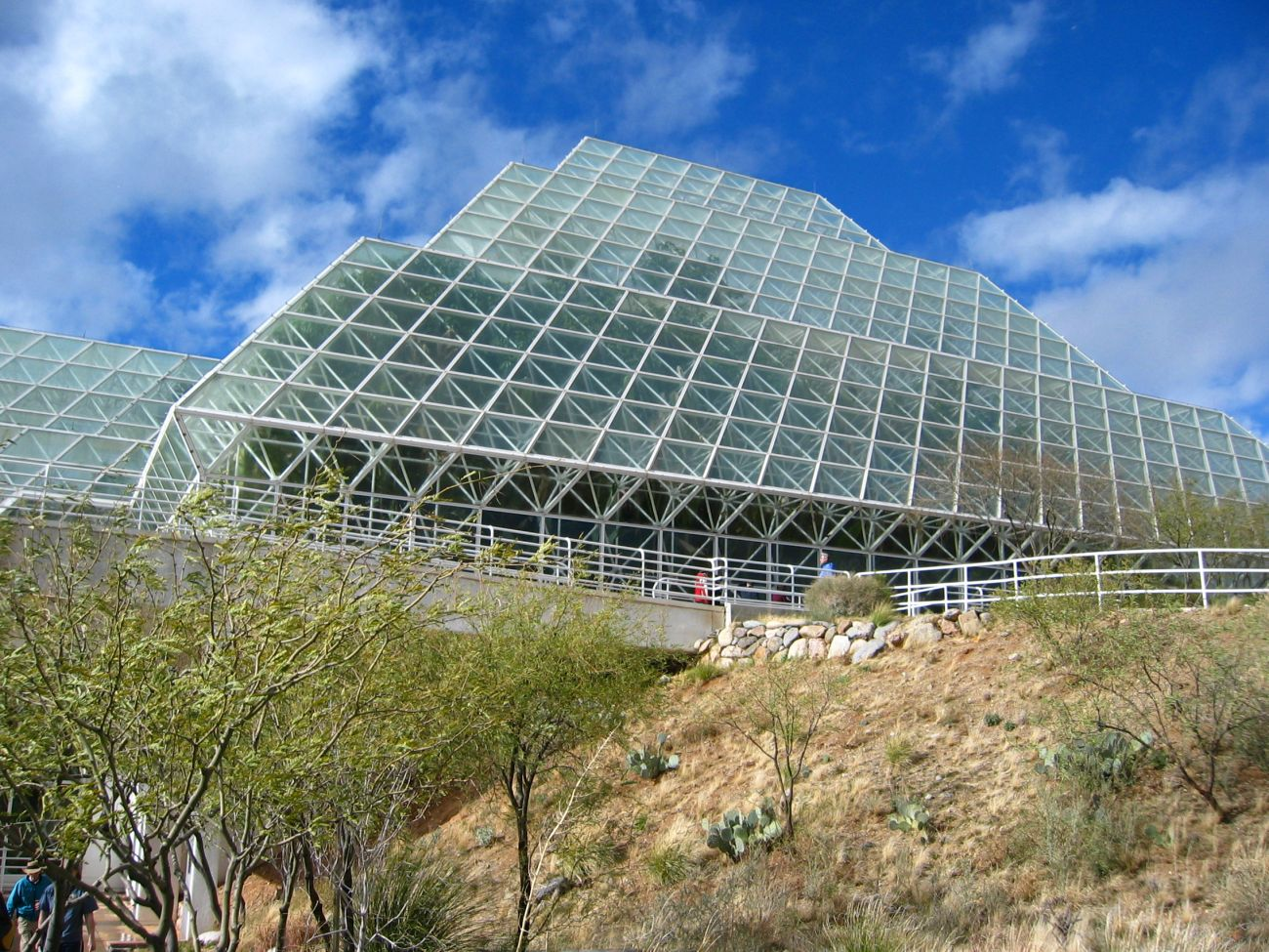 Biosphere 2, Arizona, USA, aufgenommen 12/2004